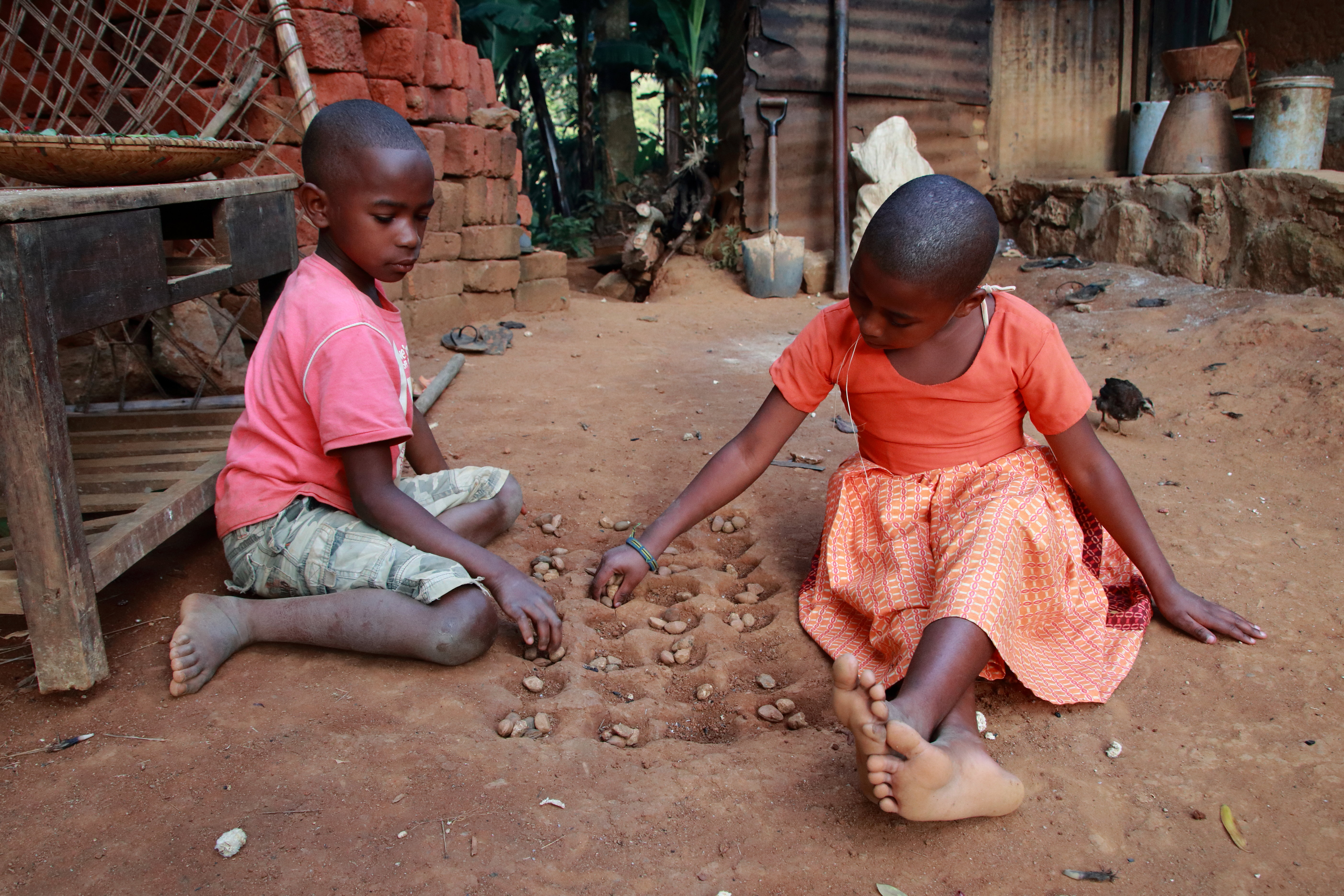 Le bao est un jeu de société traditionnel de l'Afrique de l'Est. Fabriqué dans une pièce de bois il peut également être creusé à même la terre. Les jetons sont des graines ou des petits cailloux. This is an image with the theme "Play" from: Tanzania